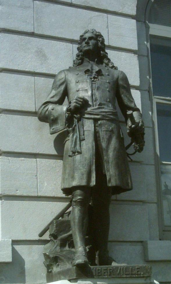 Pierre Le Moyne, Sieur d'Iberville (1661-1706), statue de la façade de l'hôtel du Parlement, Québec